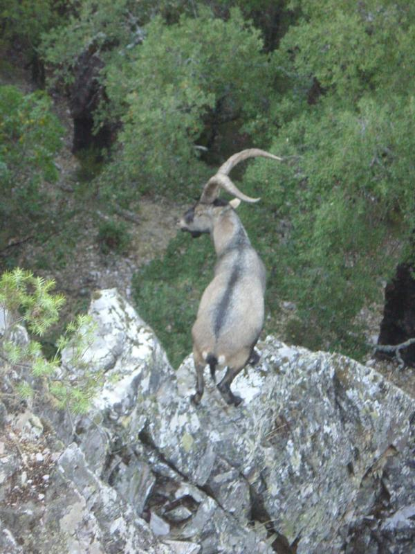 Las Casas del Conde, Provincia de Salamanca